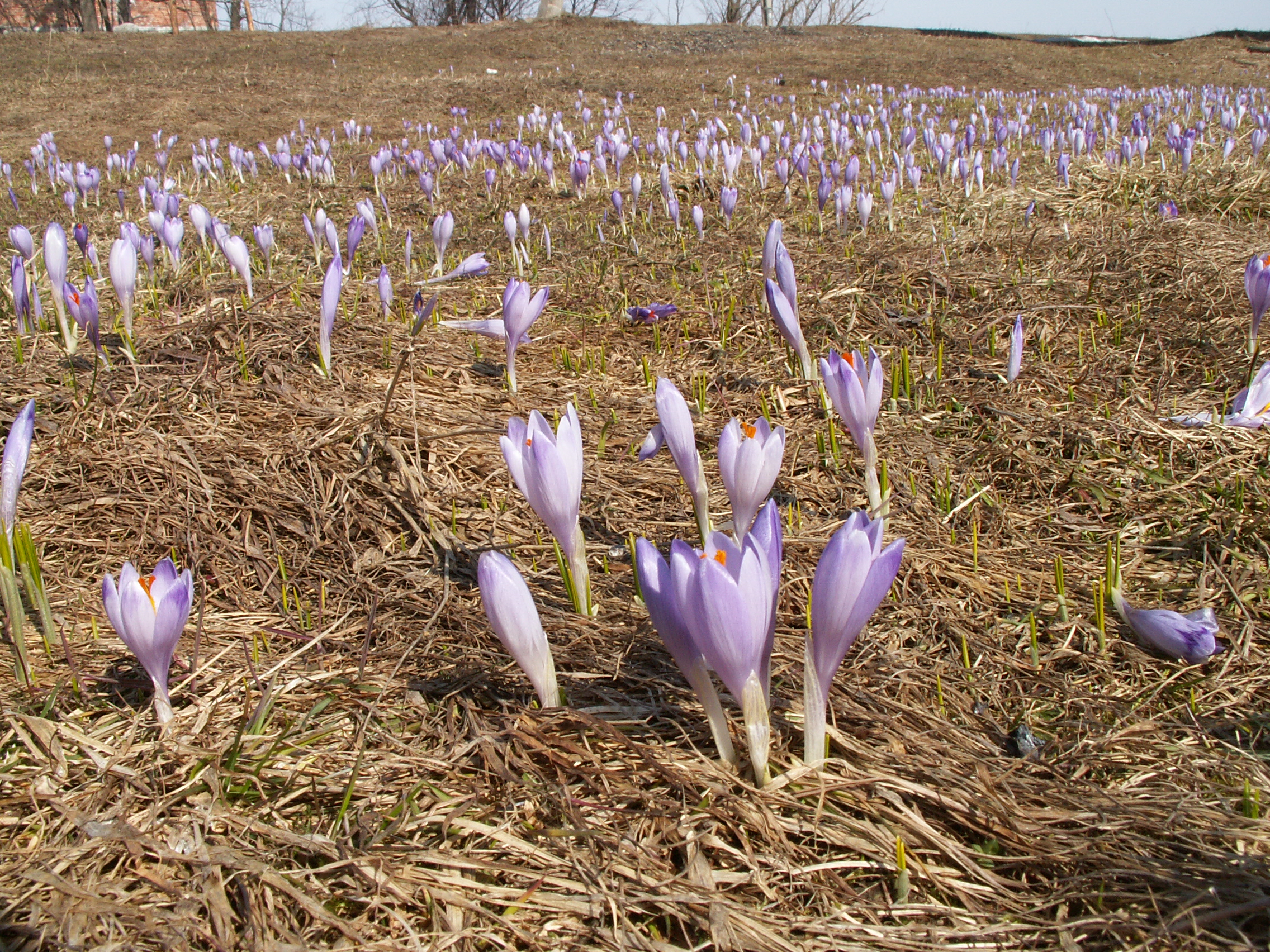 Krokusy (szafrany) na łące w miejscowości Sierockie (gm. Biały Dunajec)